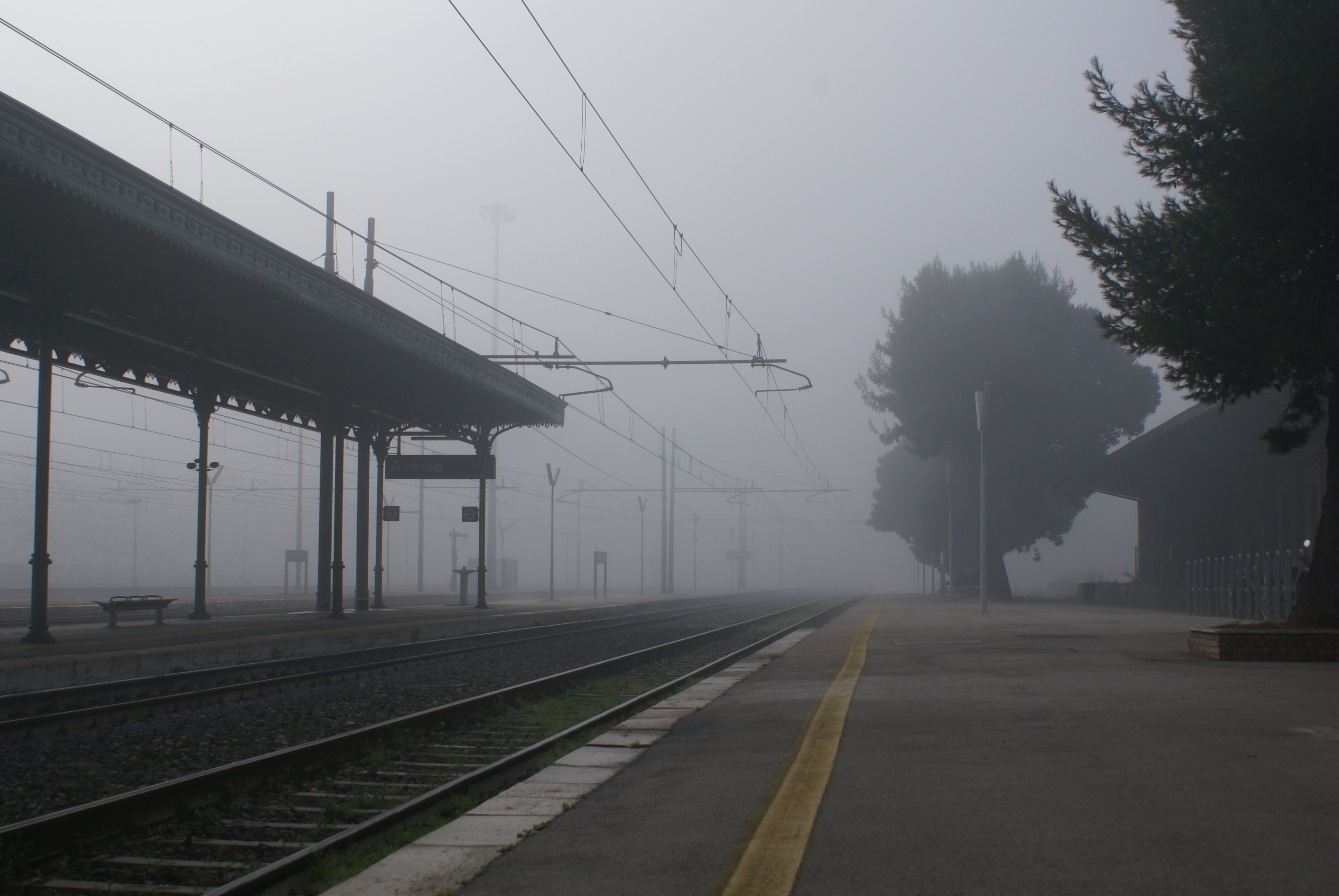 Stazione di Aversa (CE)